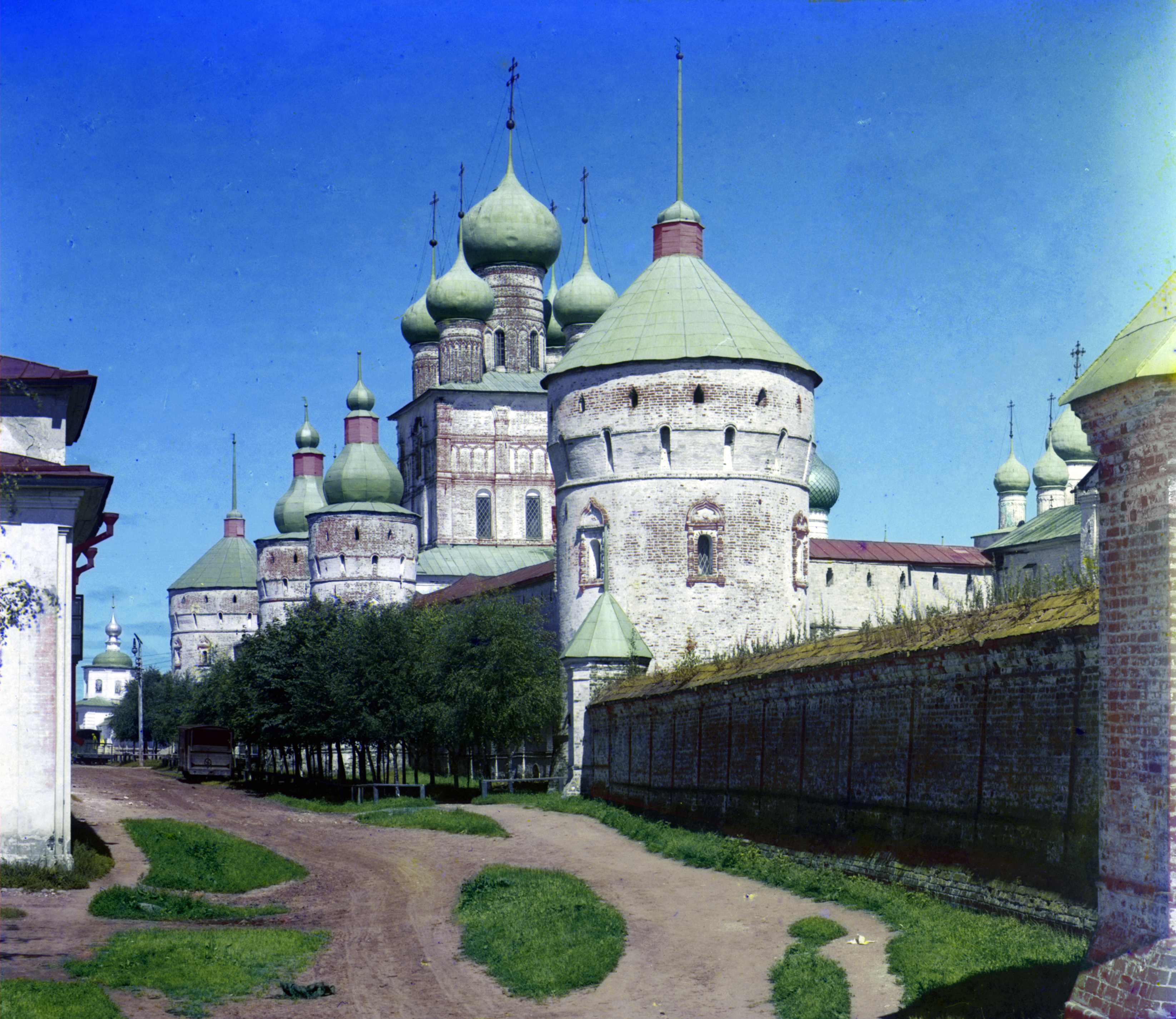 Вид на Кремль с берега озера Неро. Ростов Великий.